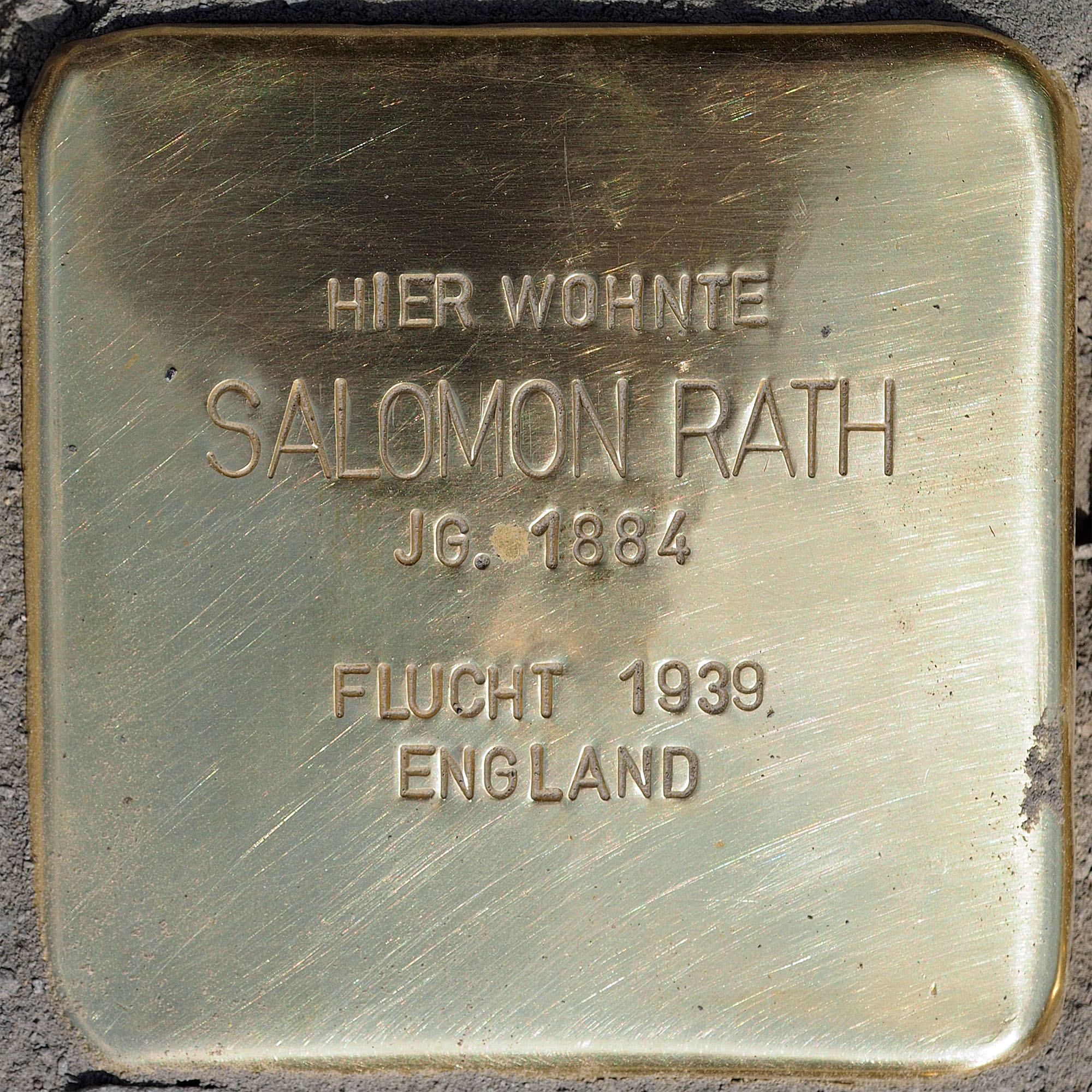 Stolpersteine Kempen: Rath, Salomon